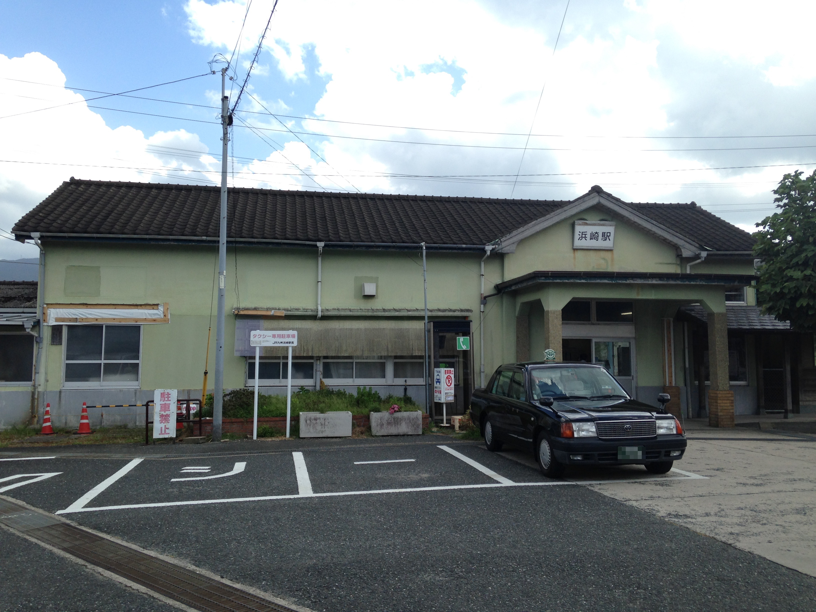 浜崎駅駅舎